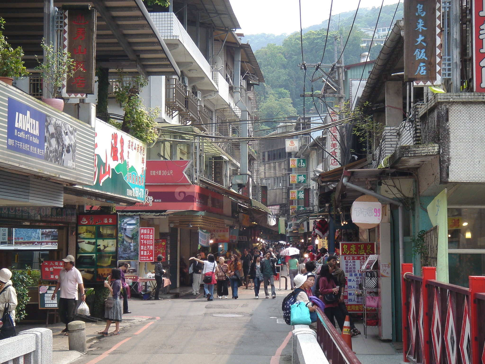 烏來商店街。